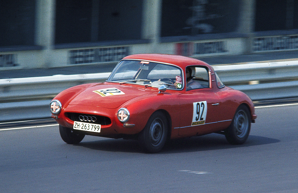 DKW Monza auf der Zielgeraden des Nürburgrings